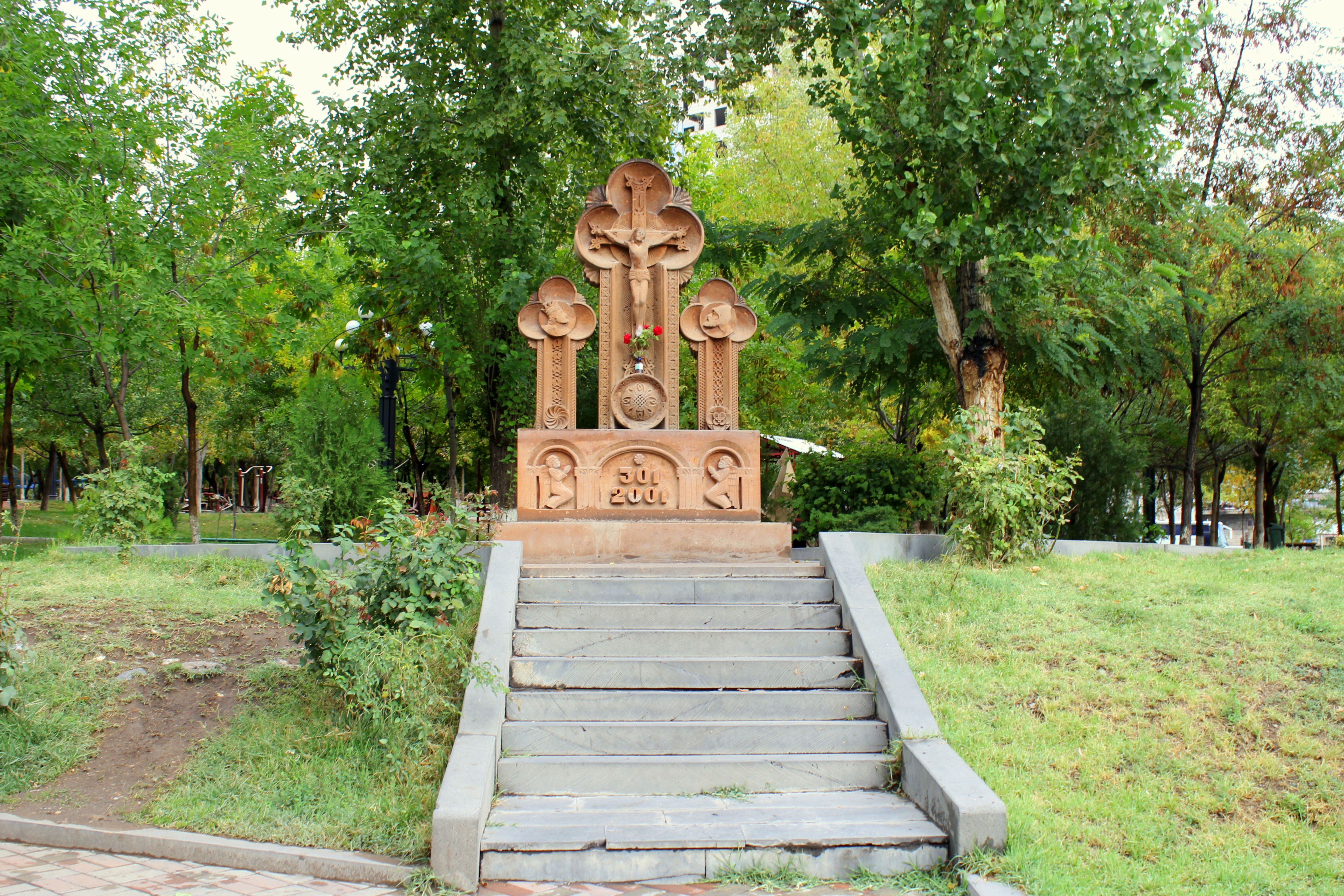 Խաչքար 1700 ամյակի